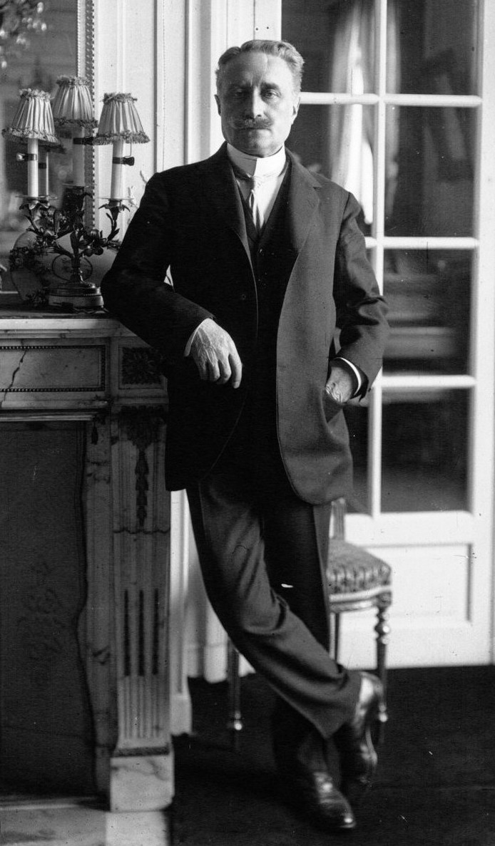 Paul Deschanel, président de la Chambre des députés, à l'hôtel de Lassay (Paris).